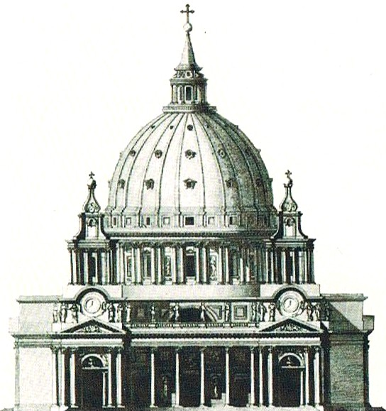 Projet de l'architecte Laurent Destouches pour l'église Sainte-Geneviève (actuel Panthéon).